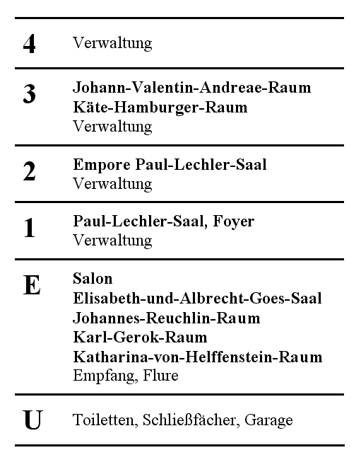 Raumbelegung des Hospitalhofs in Stuttgart.